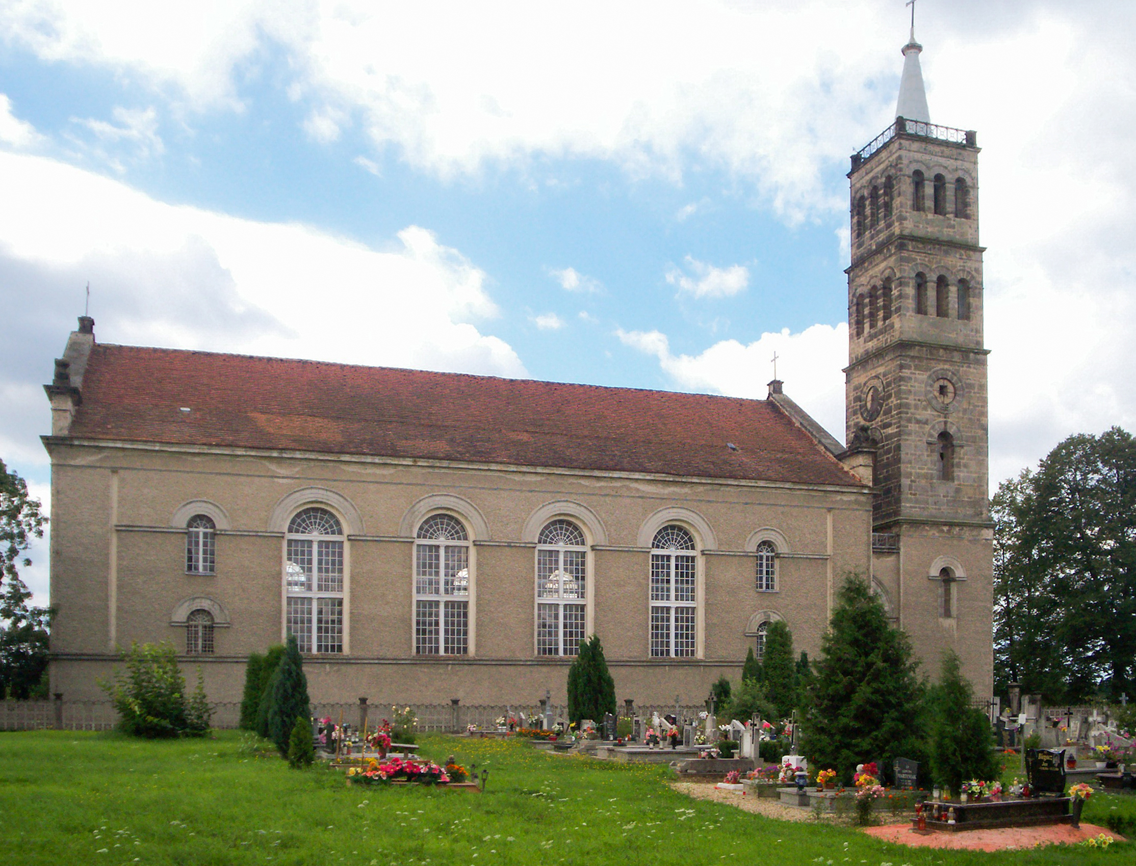 Oleszna Podgórska, kościół pw. Przemienienia Pańskiego.